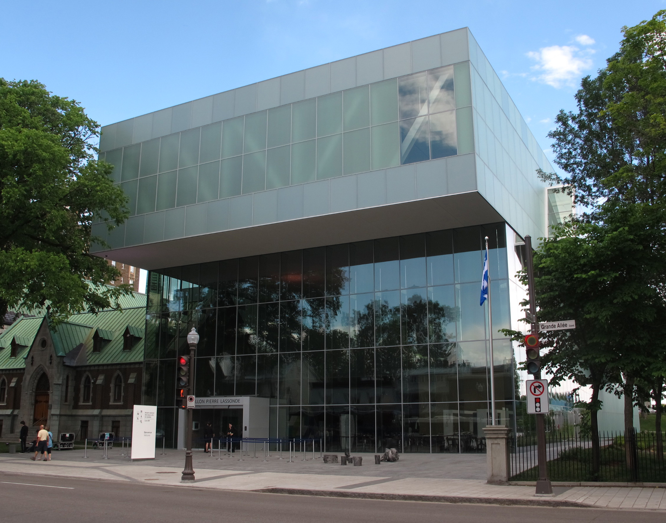 Pavillon Pierre Lassonde Musée national des beaux-arts du Québec (MNBAQ) Parc des Champs-de-Bataille Québec (Québec) Canada